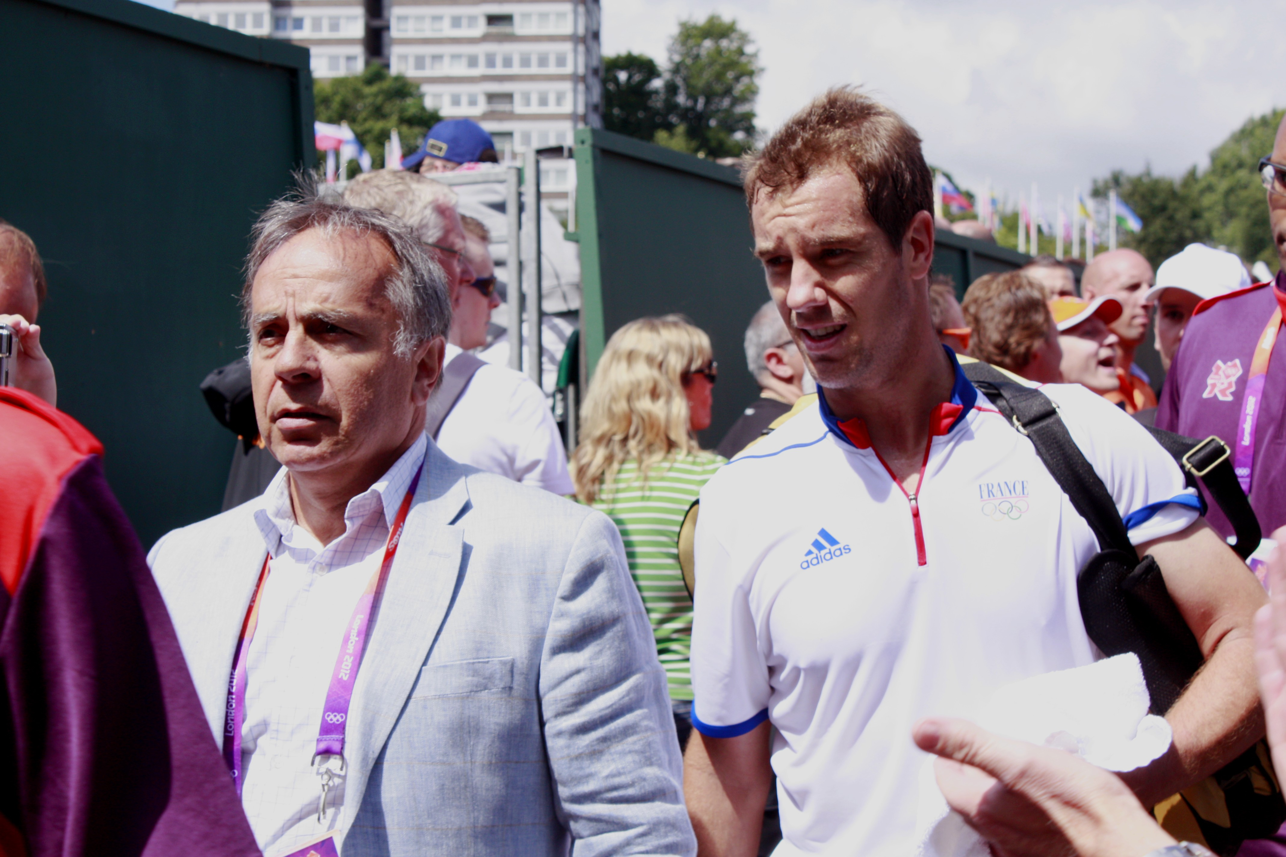 Richard Gasquet, accompagné de Patrice Dominguez, après sa victoire contre Robin Haase au 2ème tour des Jeux olympiques 2012 à Londres (Wimbledon)